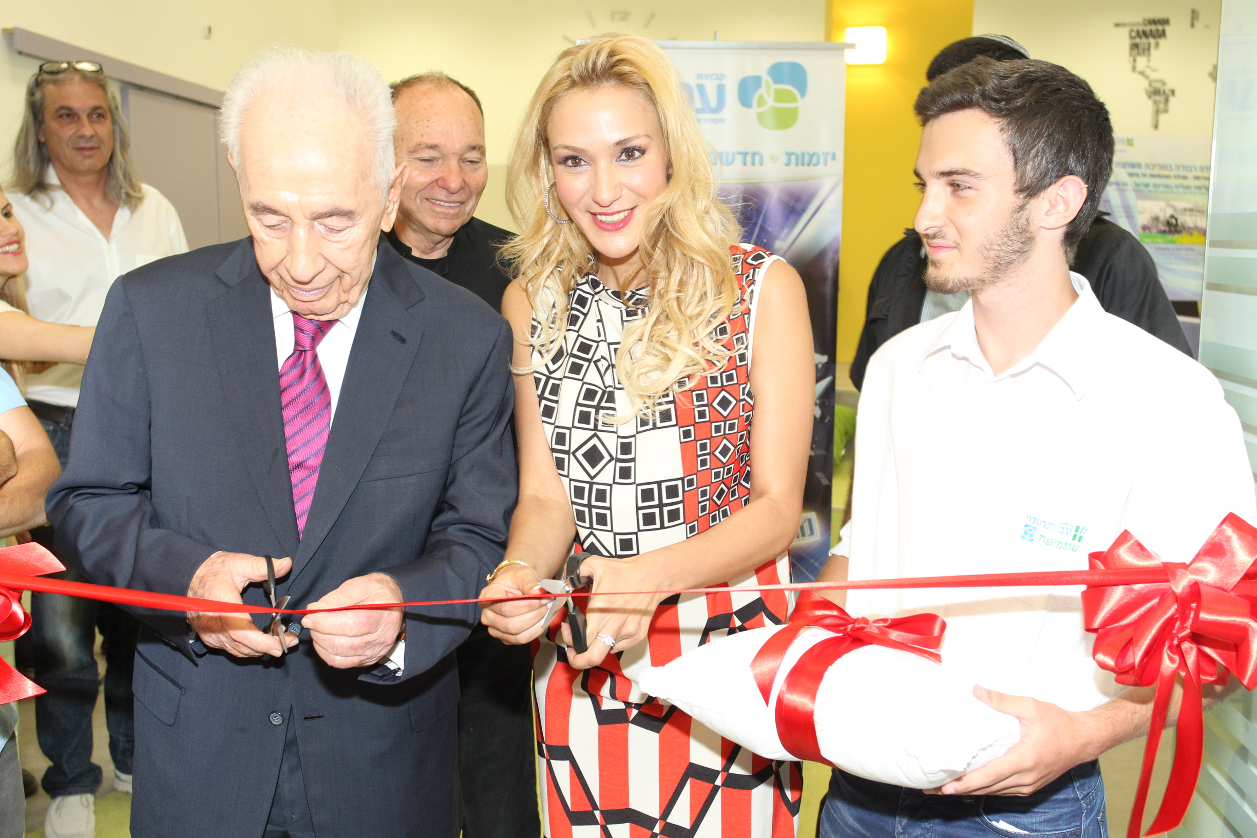 עו"ד רוית דום מנכ"לית קבוצת עמל עם שמעון פרס הנשיא התשיעי של מדינת ישראל, בחנוכת מרכז היזמות של עמל בשבח מופת תל אביב